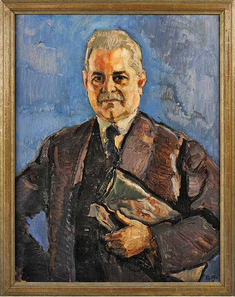 Gemälde des August de Bary.